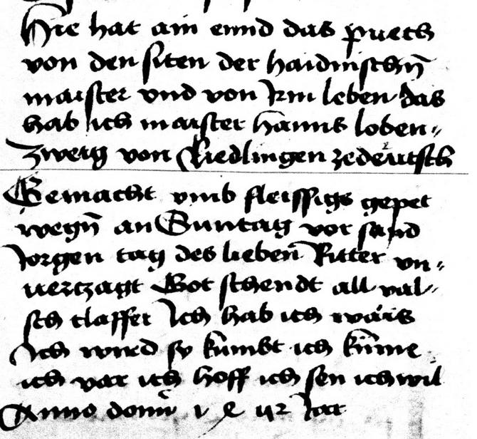 Schlussvermerk des Hans Lobenzweig Wien, Österr. Nationalbibl., Cod. 2949, Bl. 164r+v